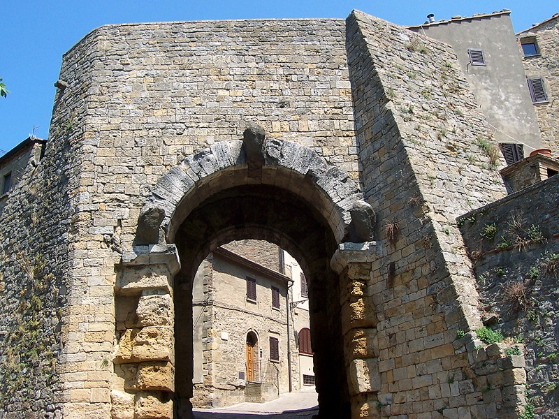 Volterra - Porta all'Arco